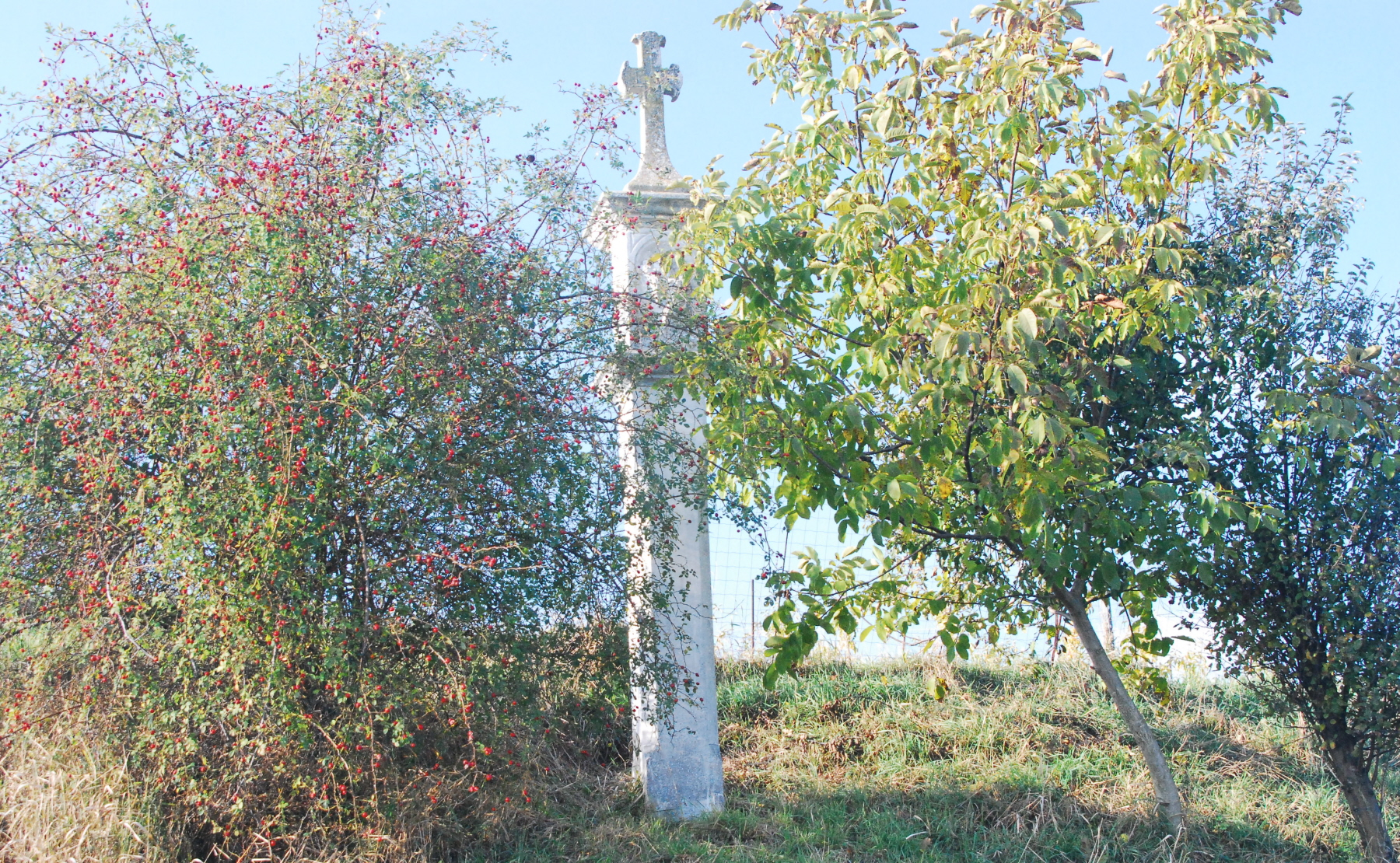 Bildstock